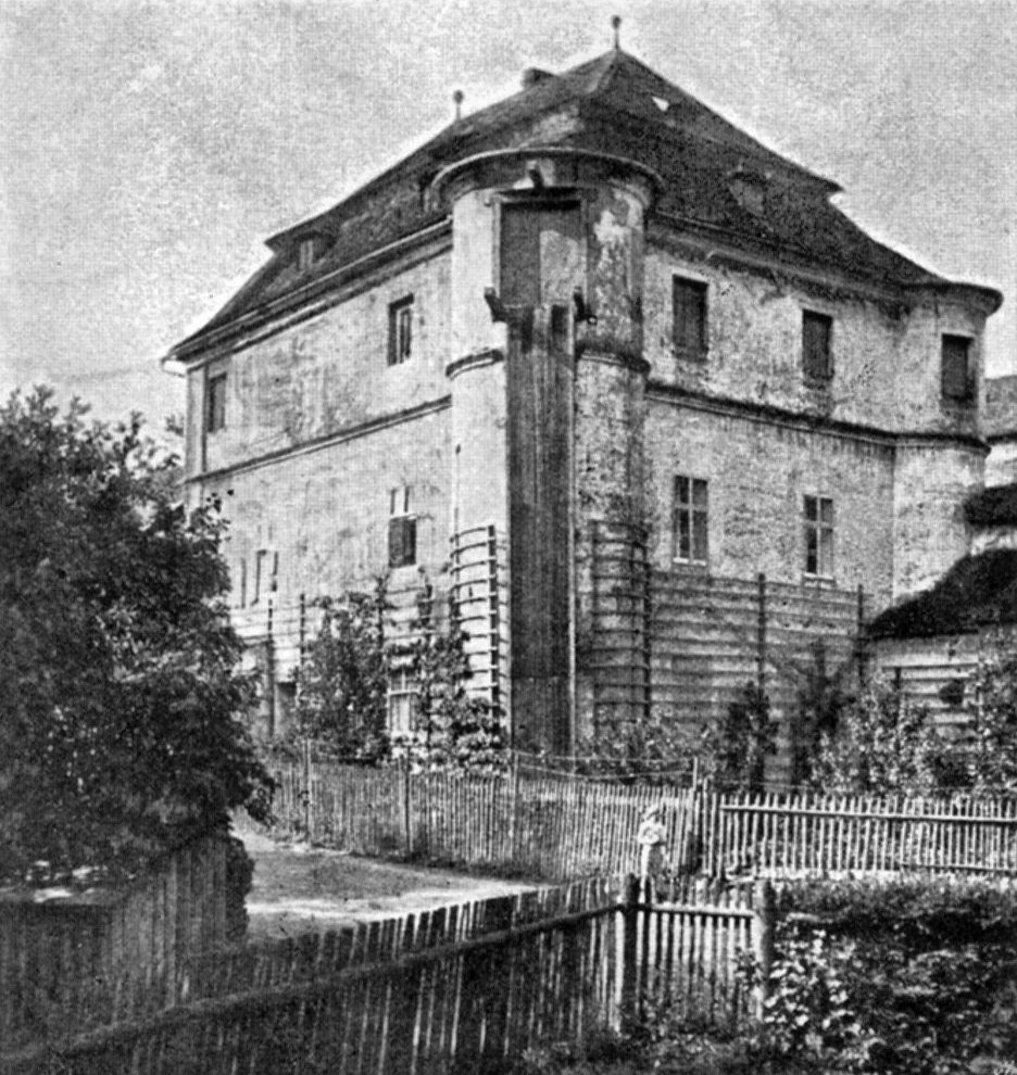 Teilaufnahme des Schlosses Leiterdorf (Altes Schloss) 1909